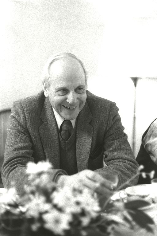 Beschreibung: Gerd Bastian 1986 im Bundestag *Quelle: selbst fotografiert